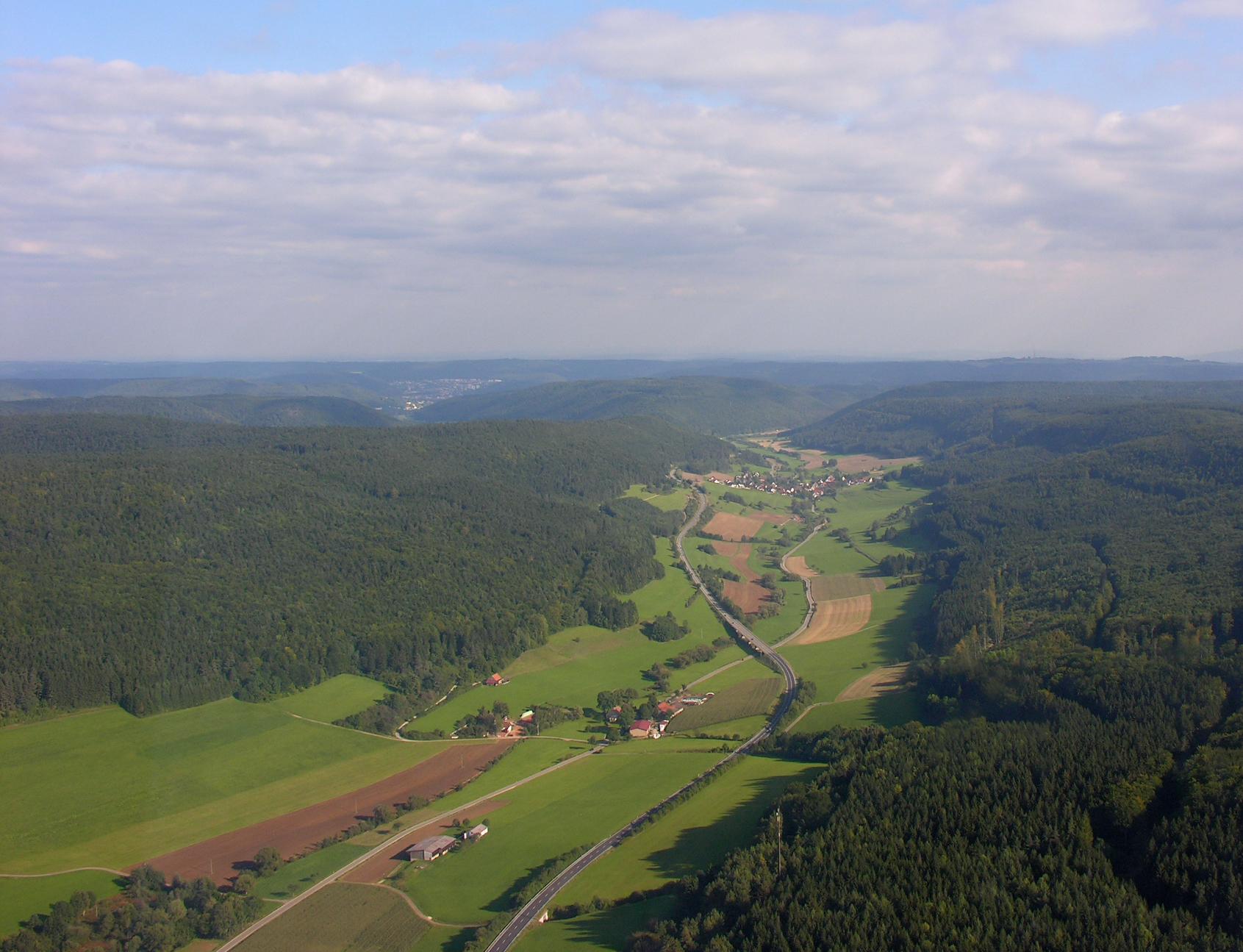 Germany, Baden-Württemberg, aerial view Eßlingen (Tuttlingen)